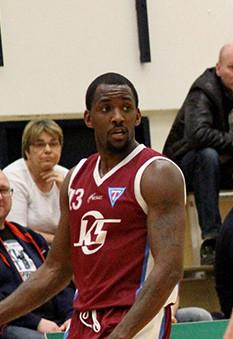 Tindastóll Vs. Keflavík in 2015 in Keflavík.